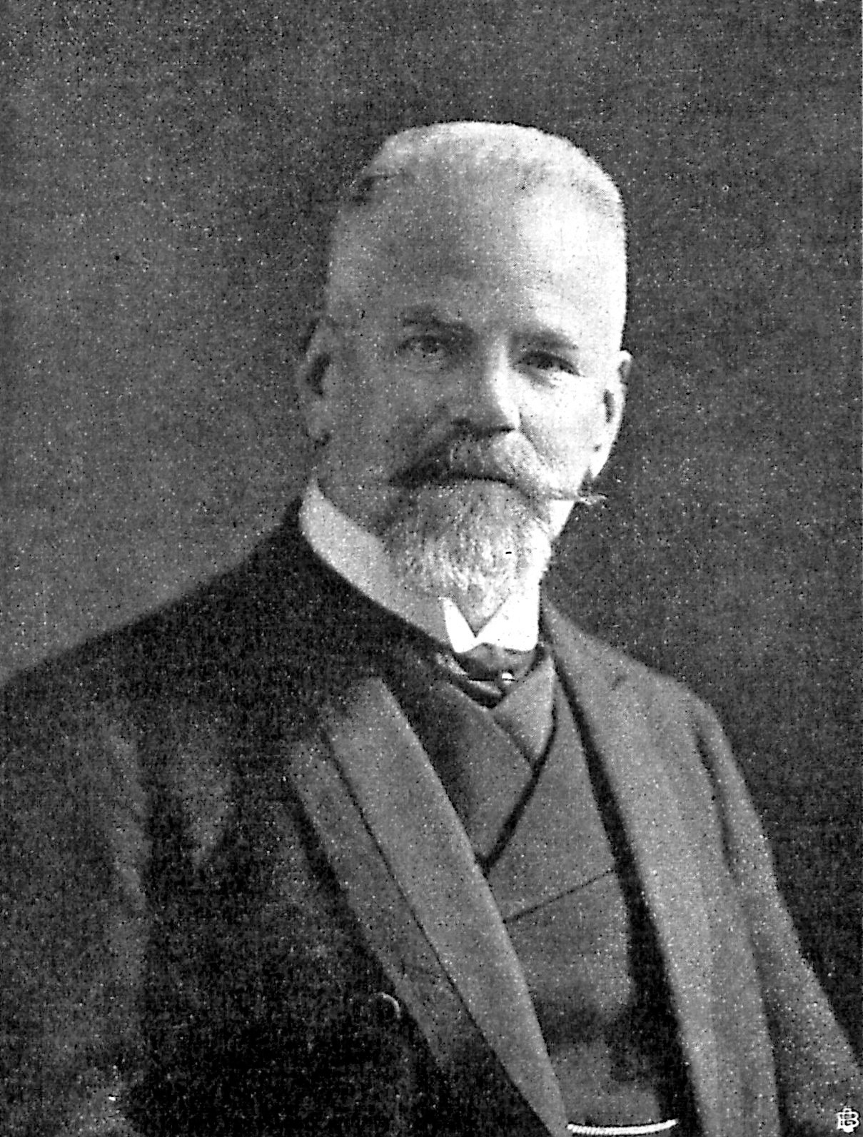 Der am 1. Oktober 1913 zum stimmführenden Bevollmächtigten Lübecks, zu seinem Stellvertreter der neue Hanseatische Gesandte Karl Sieveking, im Bundesrat ernannte bisherige Stellvertreter Senator Dr. Fehling.